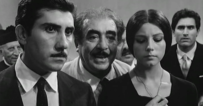 Screenshot del film Sedotta e abbandonata (1964) di Pietro Germi.